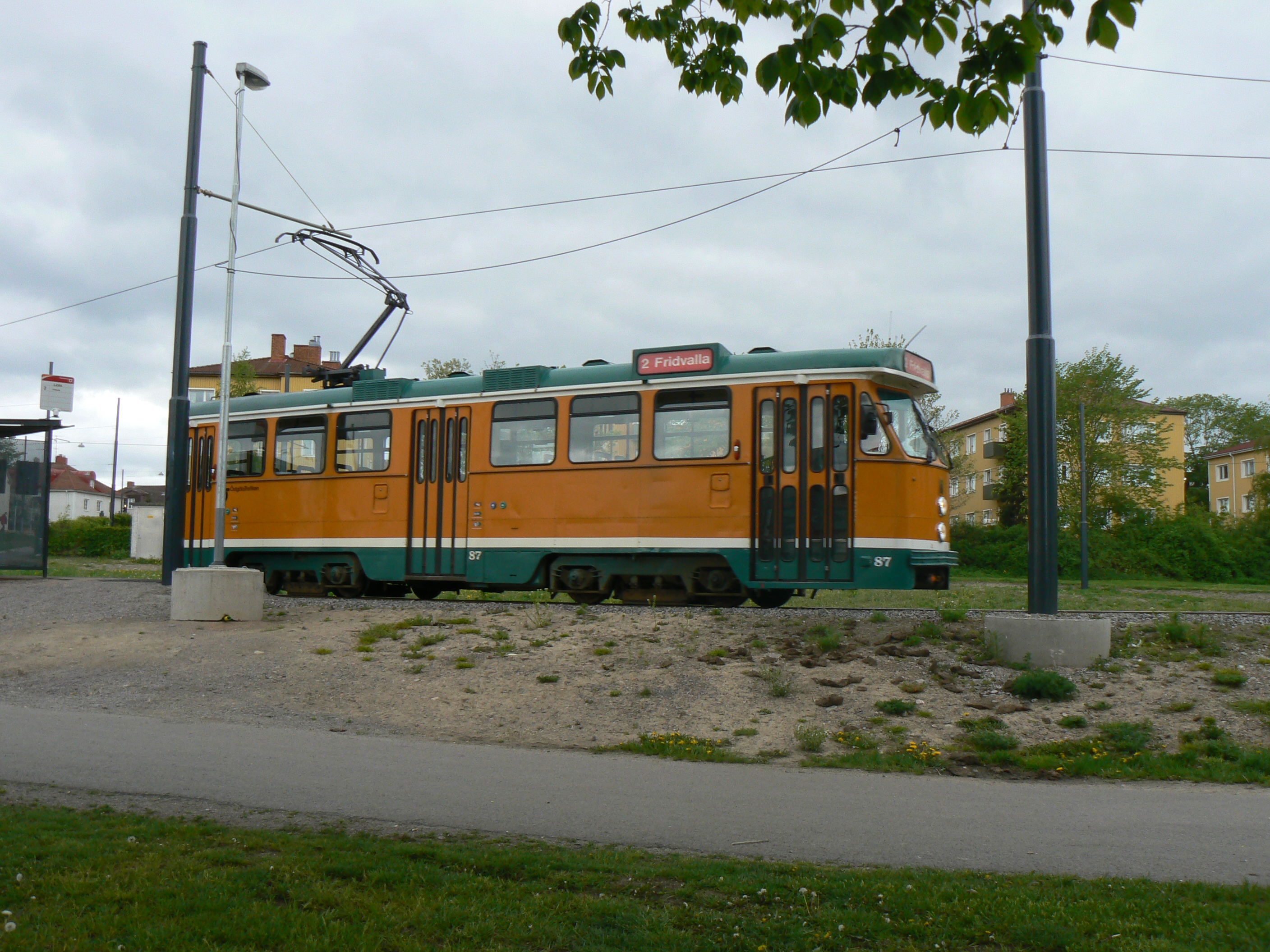 M67 tram at Ljura in Norrköping, Sweden.